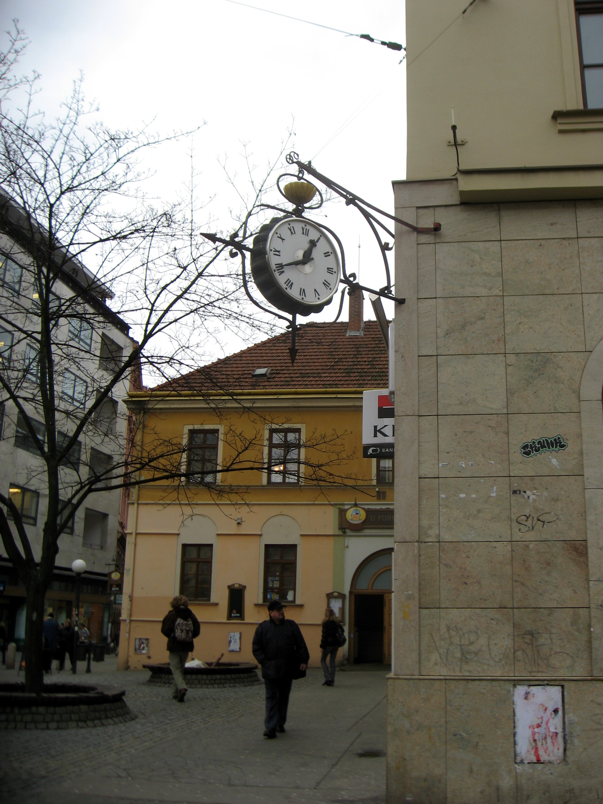 Hodiny na České, známé místo pro setkání v Brně